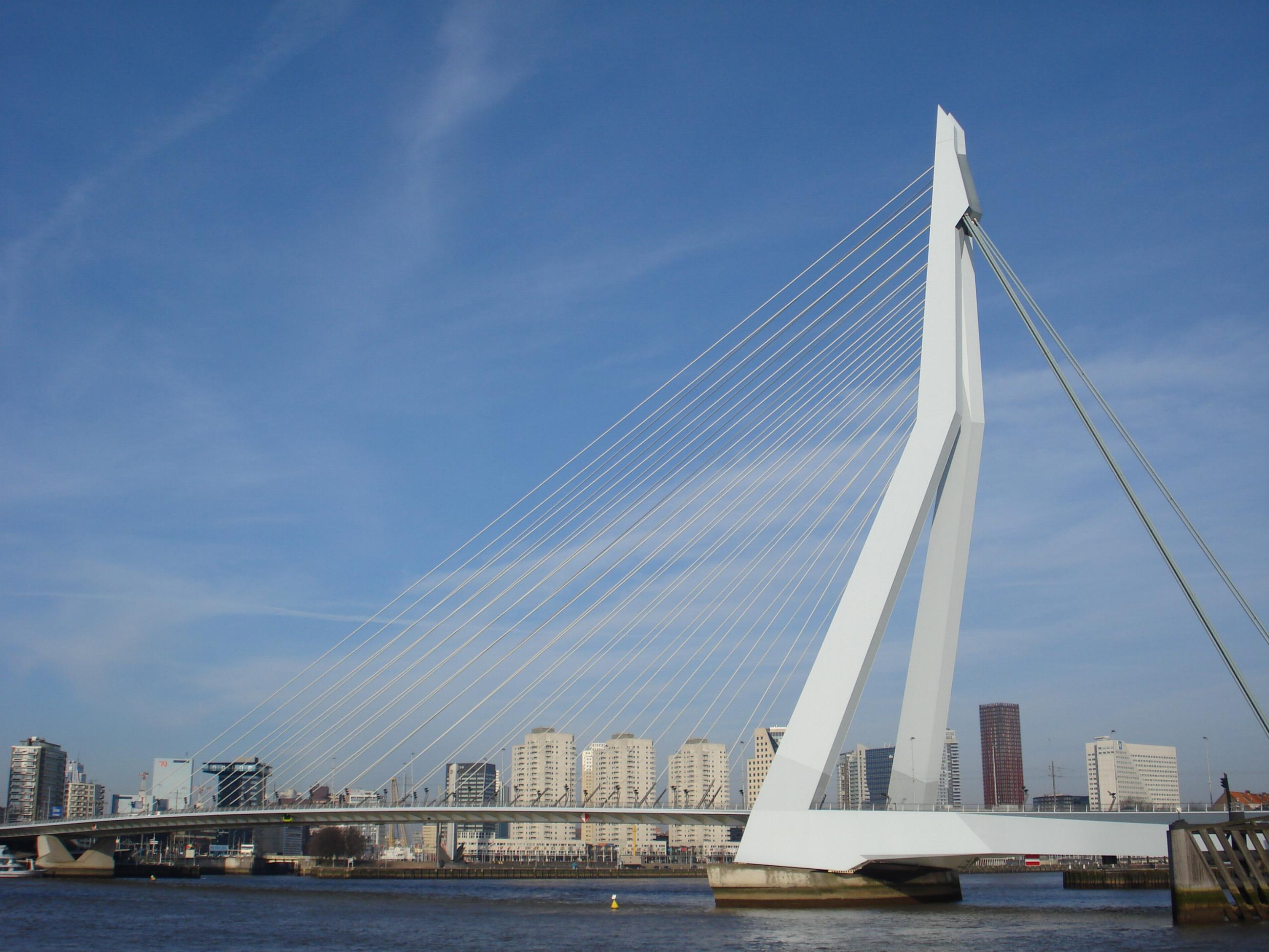 Rotterdam, Erasmusbrug ("De Zwaan").